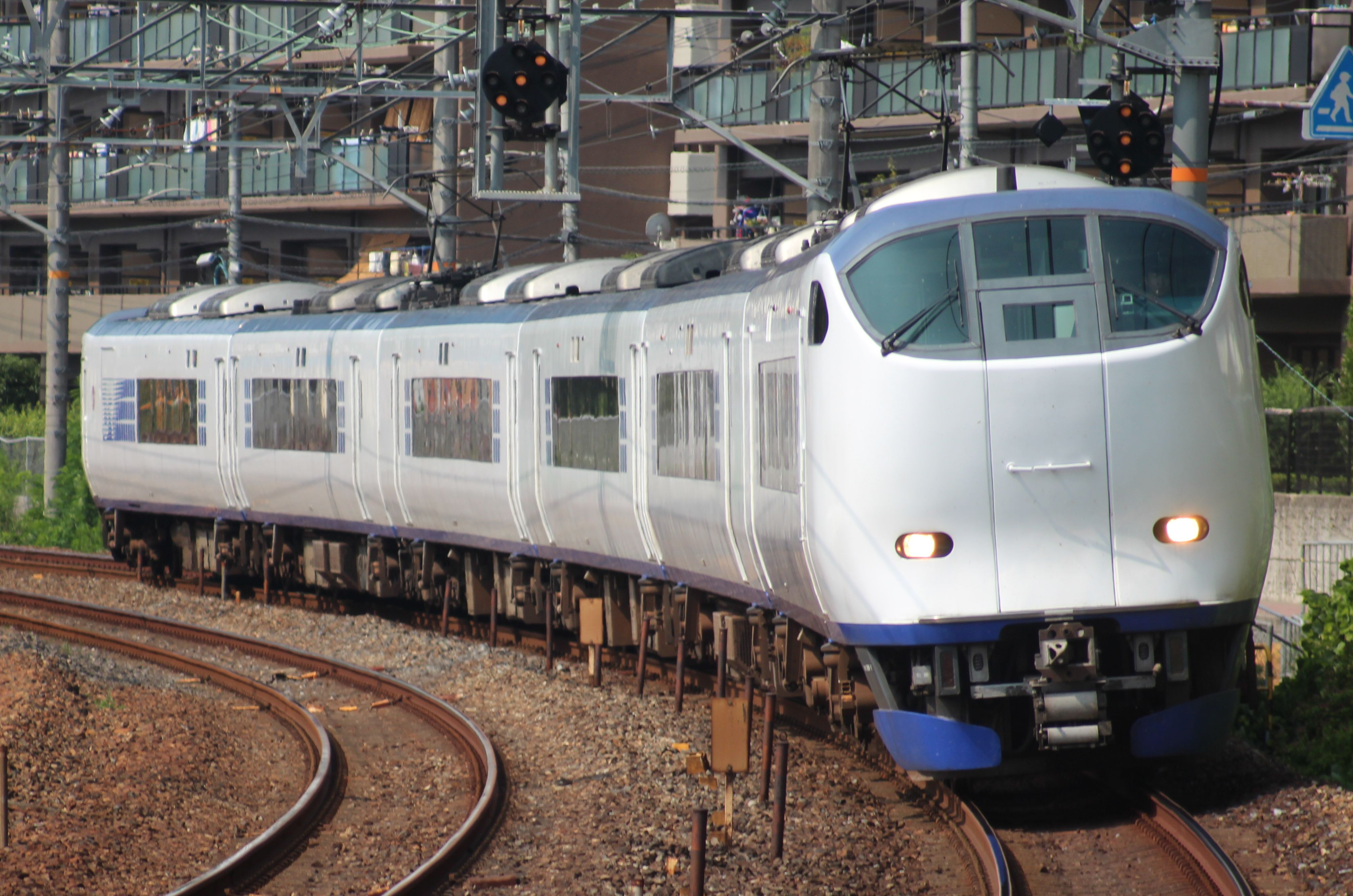 JR西日本281系電車